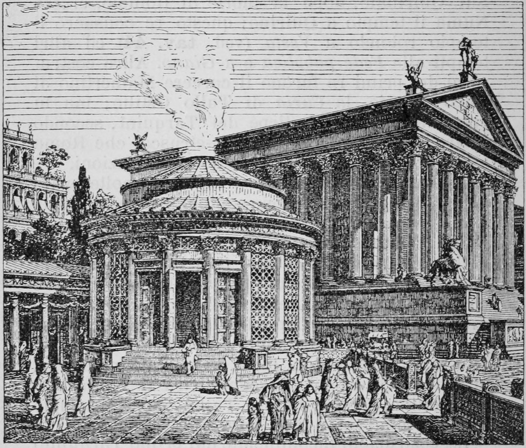 Illustrazione da Trattato di archeologia (Gentile).djvu.